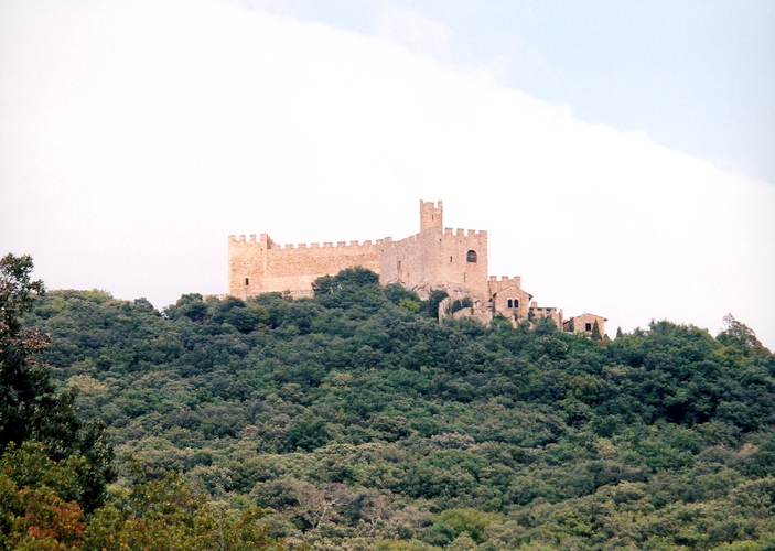 Castell de Requesens (la Jonquera, Alt Empordà)